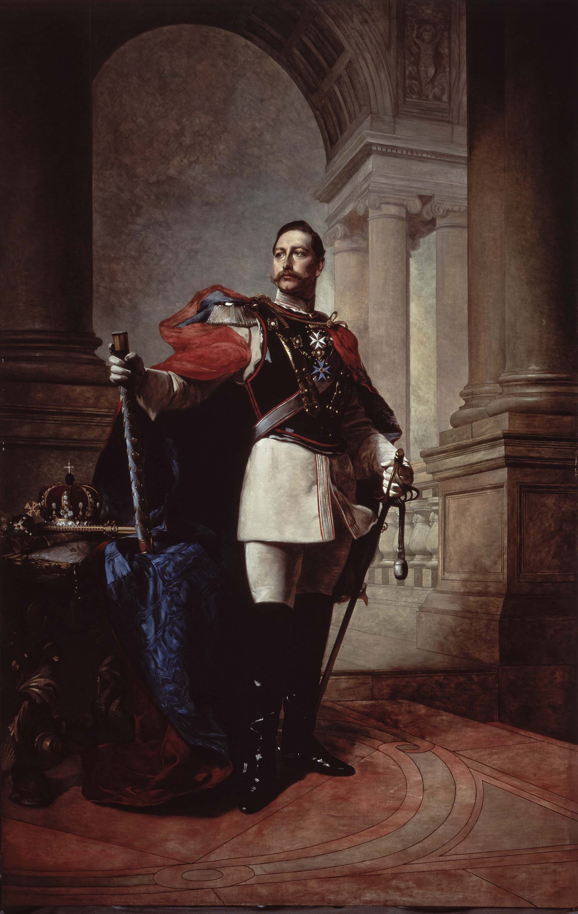 Retrato do Imperador da Alemanha Guilherme IItitle QS:P1476,pt:"Retrato do Imperador da Alemanha Guilherme II" label QS:Lpt,"Retrato do Imperador da Alemanha Guilherme II"